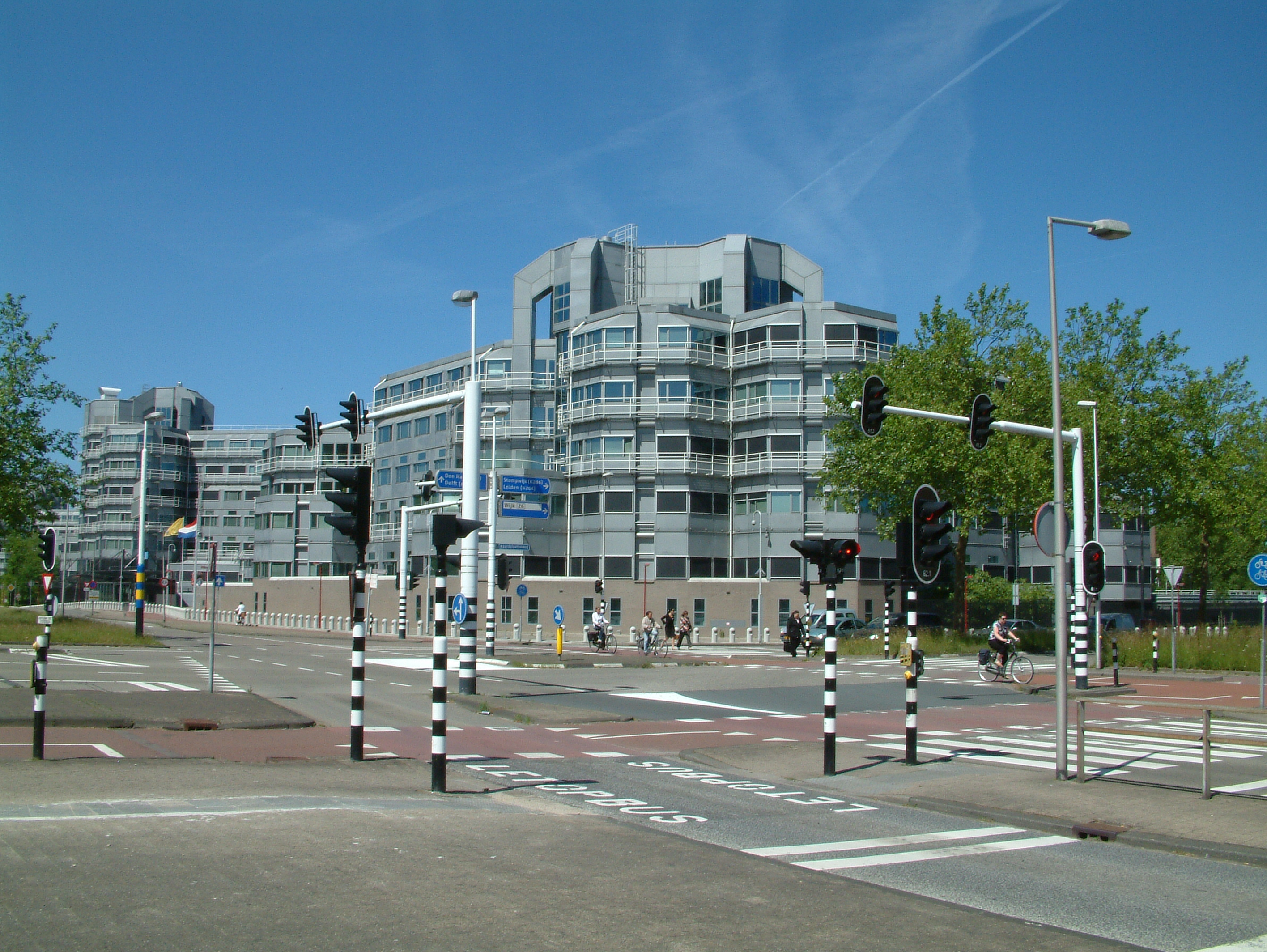 Bouwwerk in Zoetermeer